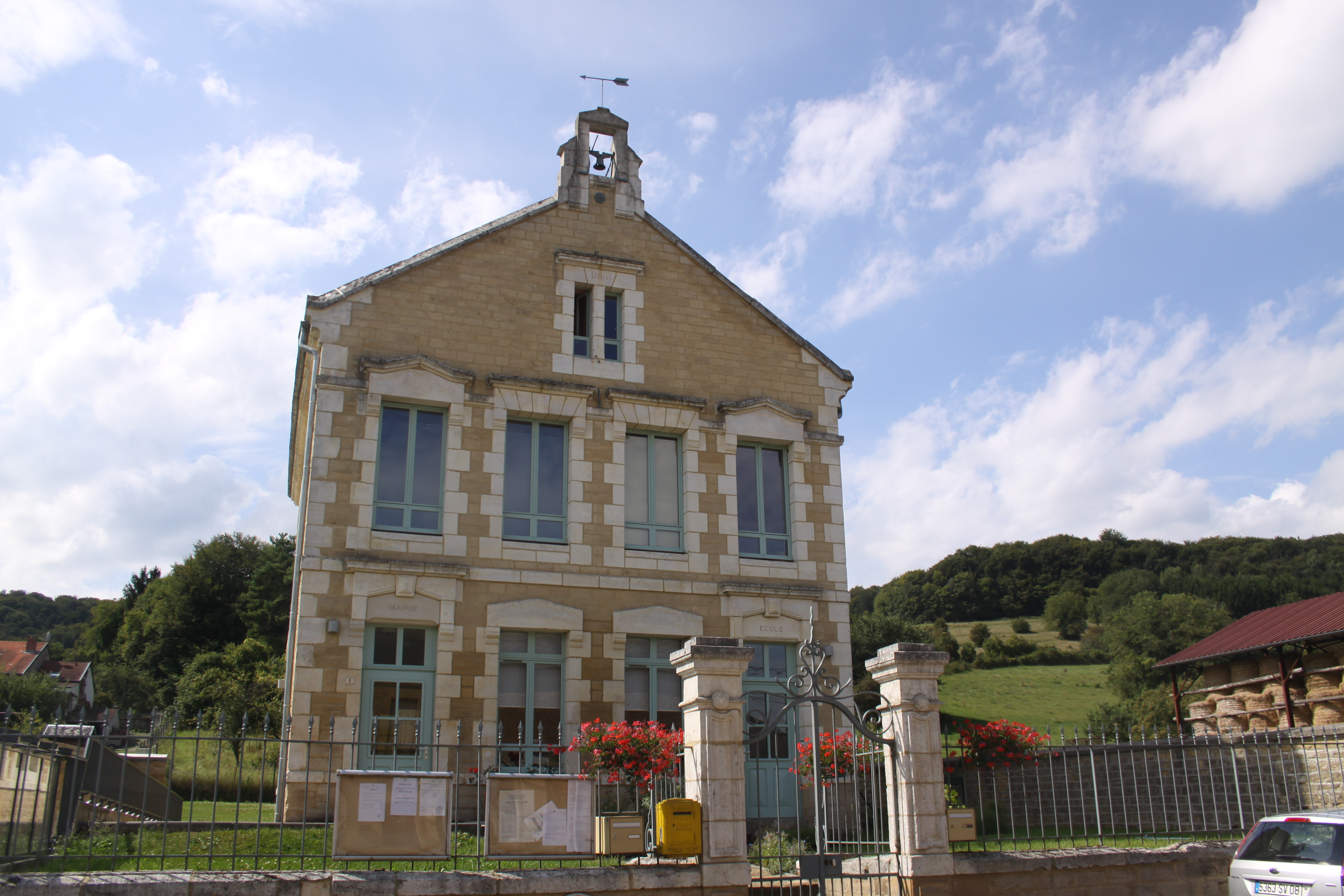 Village Ardennais